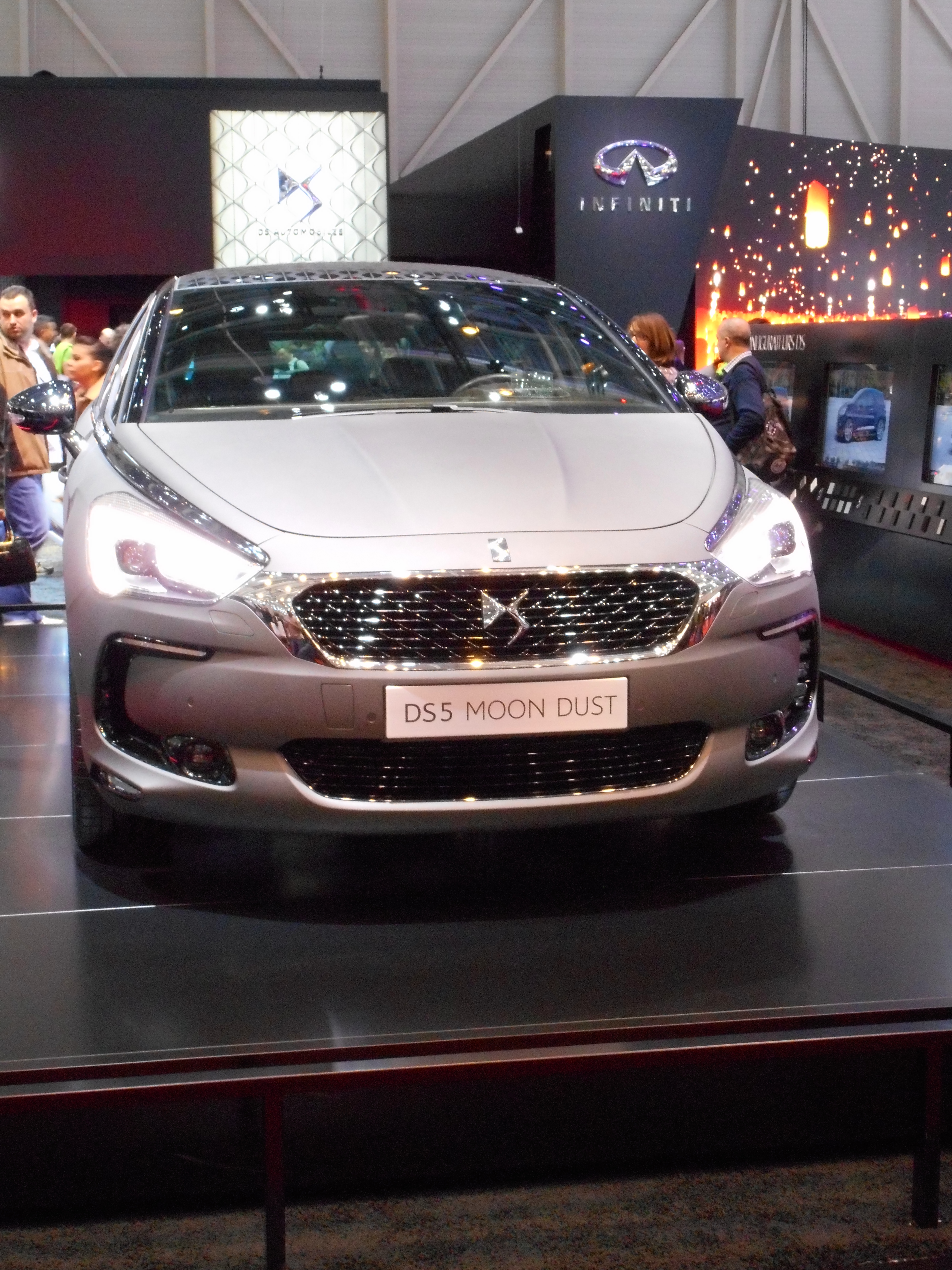 Salon de l'auto de Genève le 8 mars 2015.